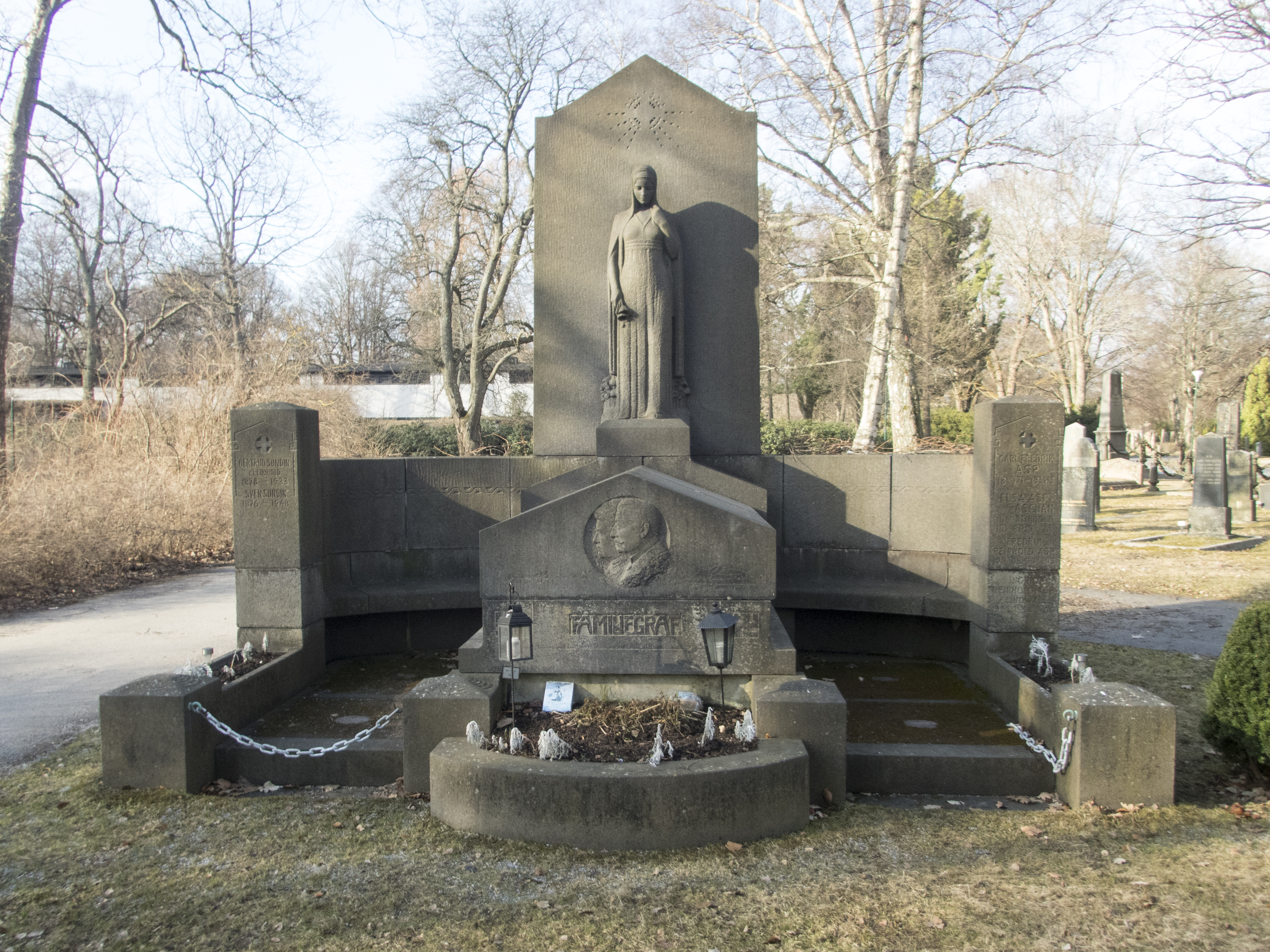 Reinholdska familjegraven, rest 1911 för Friedrich August Reinhold. Norra begravningsplatsen, kvarter 10A, gravnummer 00434 Gravskulptur av John Färngren